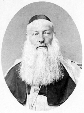 Giuseppe Valerga, lateinischer Patriarch von Jerusalem (Original rükseitig beschriftet)